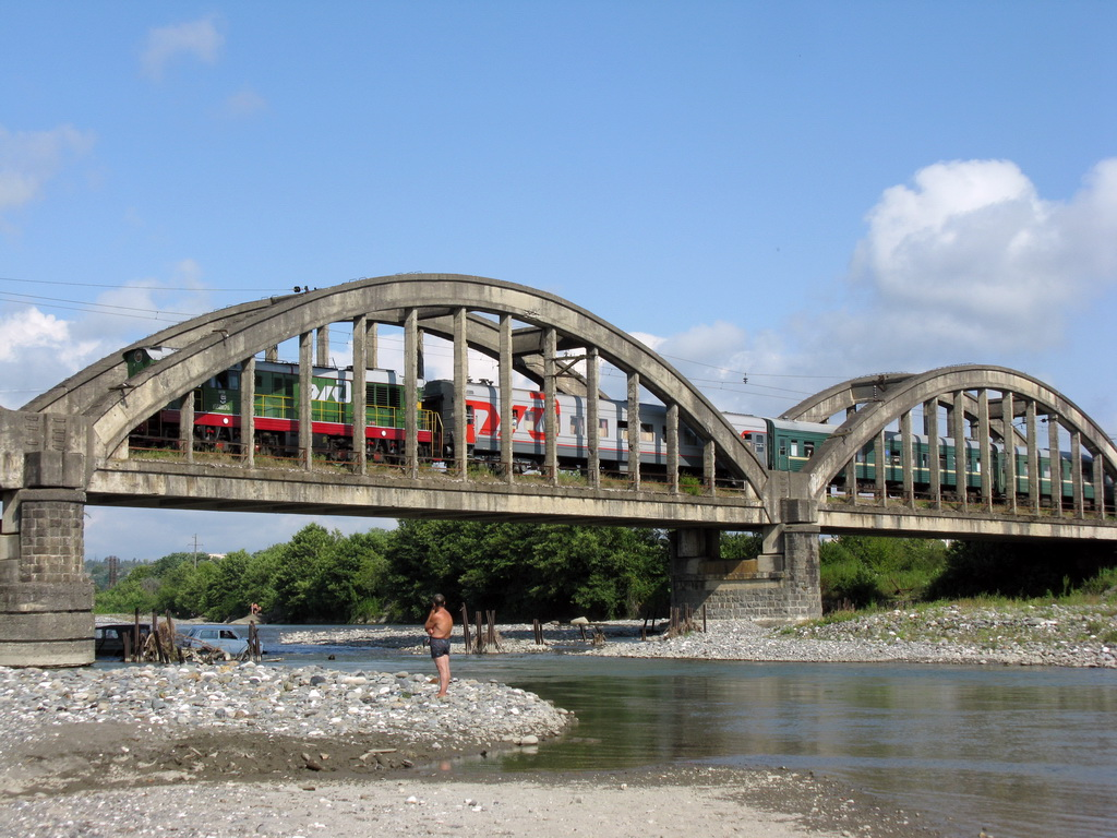 Вагоны поезда Москва-Сухум на мосту через р. Гумиста